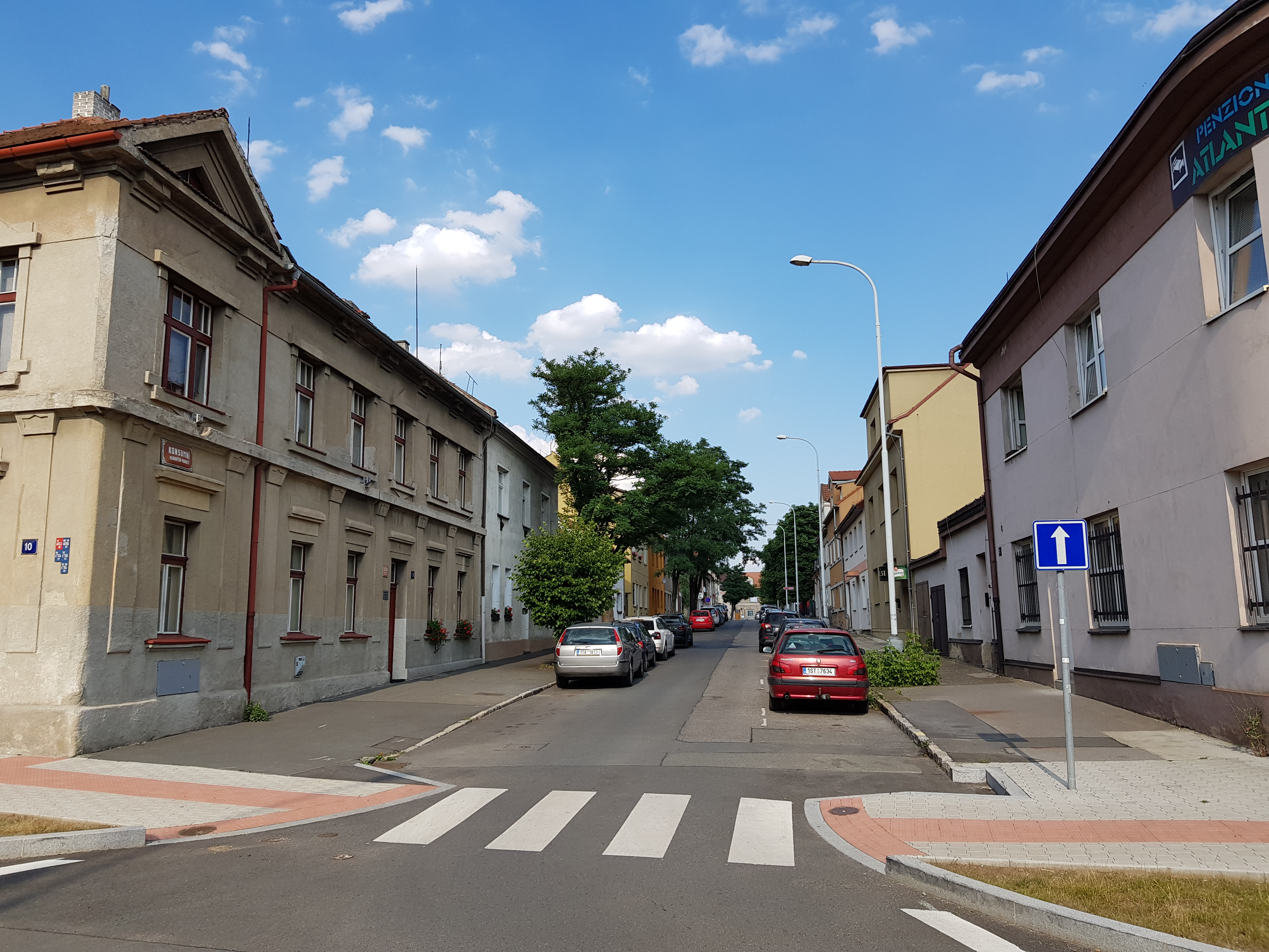 Konzumní ulice, Praha 14-Hloubětín, pohled od Kbelské východním směrem